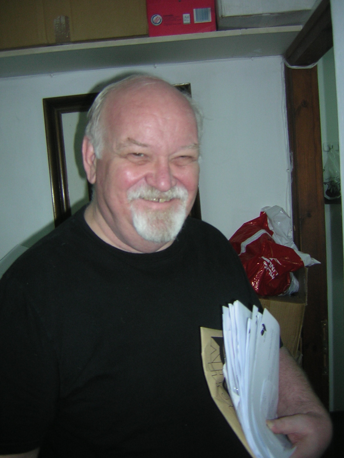 גרי בילו ז"ל